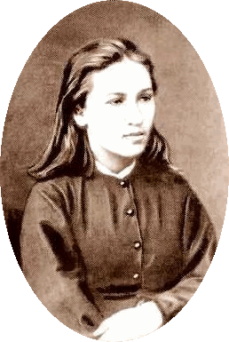 Vera Zasulic (1849-1919)